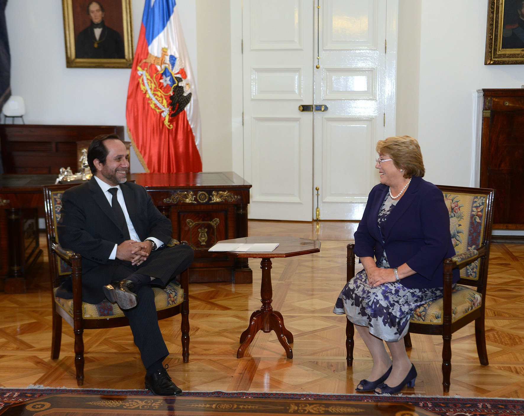 Presidenta Bachelet recibe el saludo protocolar del Contralor General de la República, Ramiro Mendoza